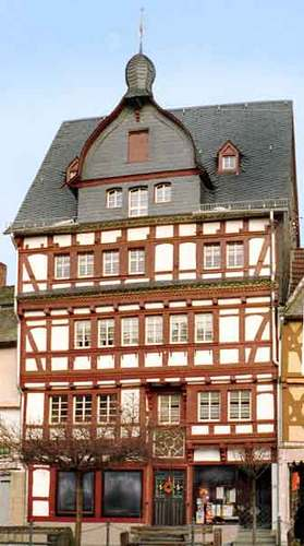 Denkmalgeschütztes Fachwerkhaus Markt 8 in Adenau/Eifel; Baujahr 1630